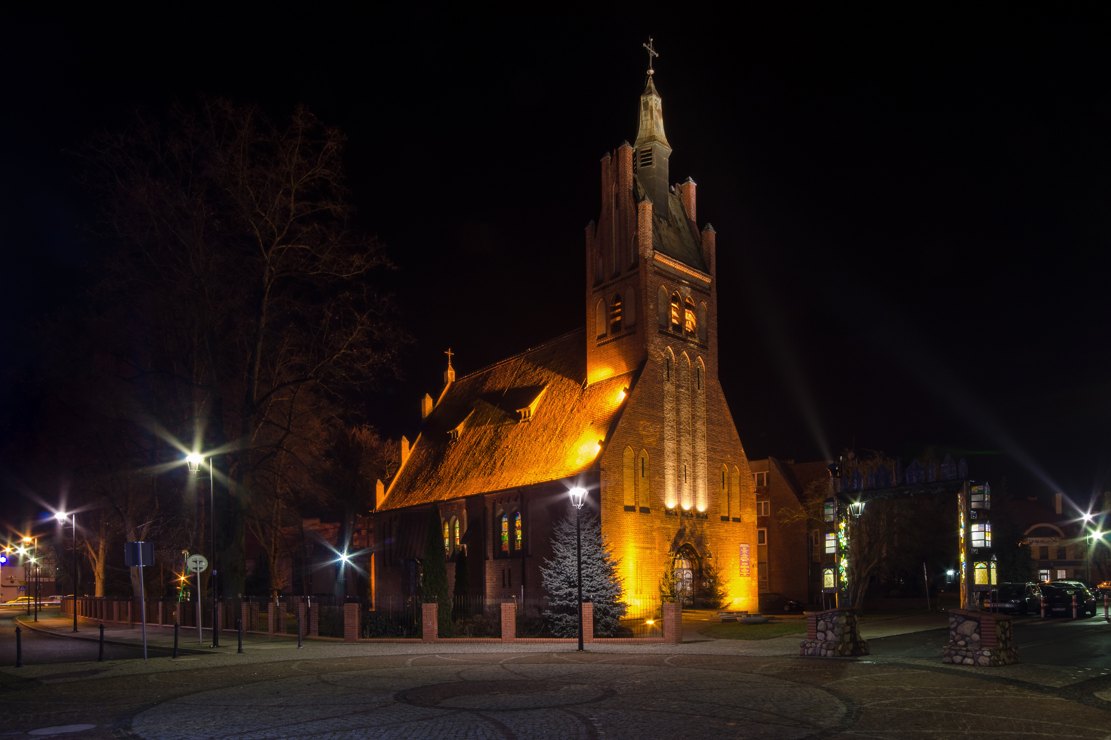 Lubin, ul. Bolesława Prusa 4 - kościół Najświętszego Serca Pana Jezusa (1900-1906)